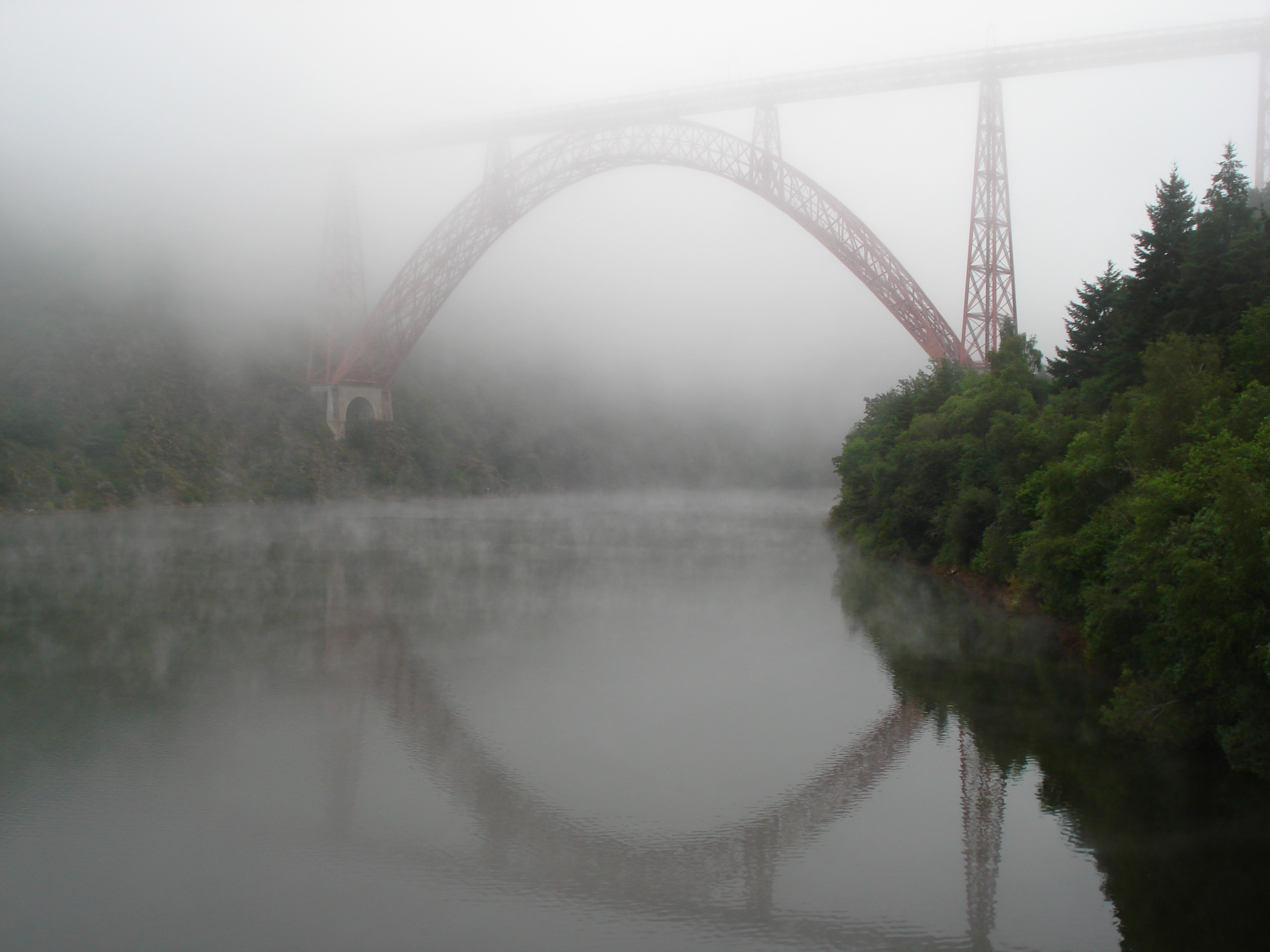 Sous la brume le lendemain matin